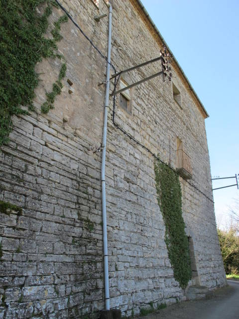 Castell de La Manresana a la Segarra - Catalunya